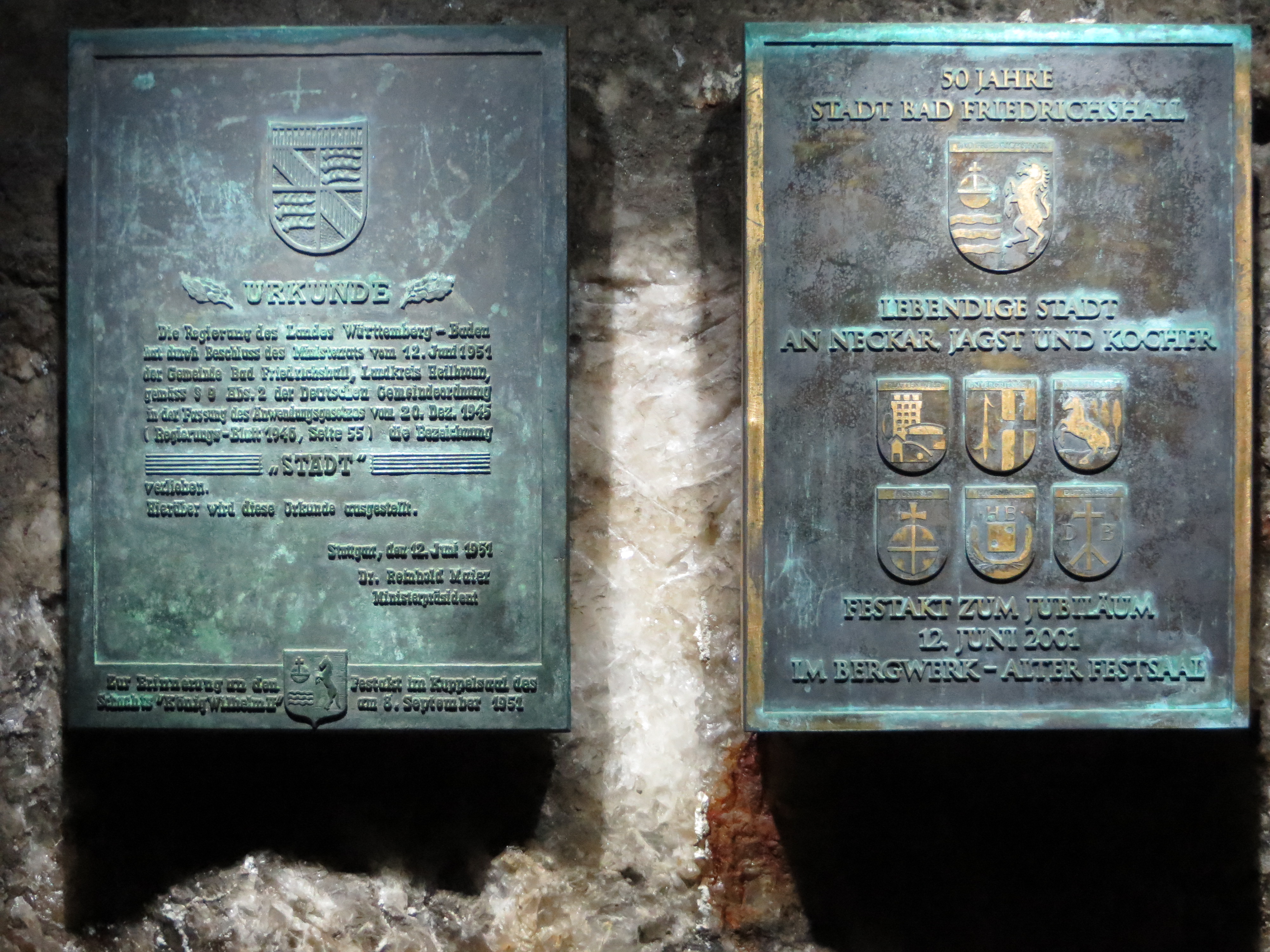 Plakette im Kuppelsaal des Besucherbergwerks mit der Urkunde des Lades Württemberg-Baden zur Stadterhebung Bad Friedrichshalls 1951 (links). Rechts Plakette zum 50-jährigen Jubiläum der Stadterhebung 2001.